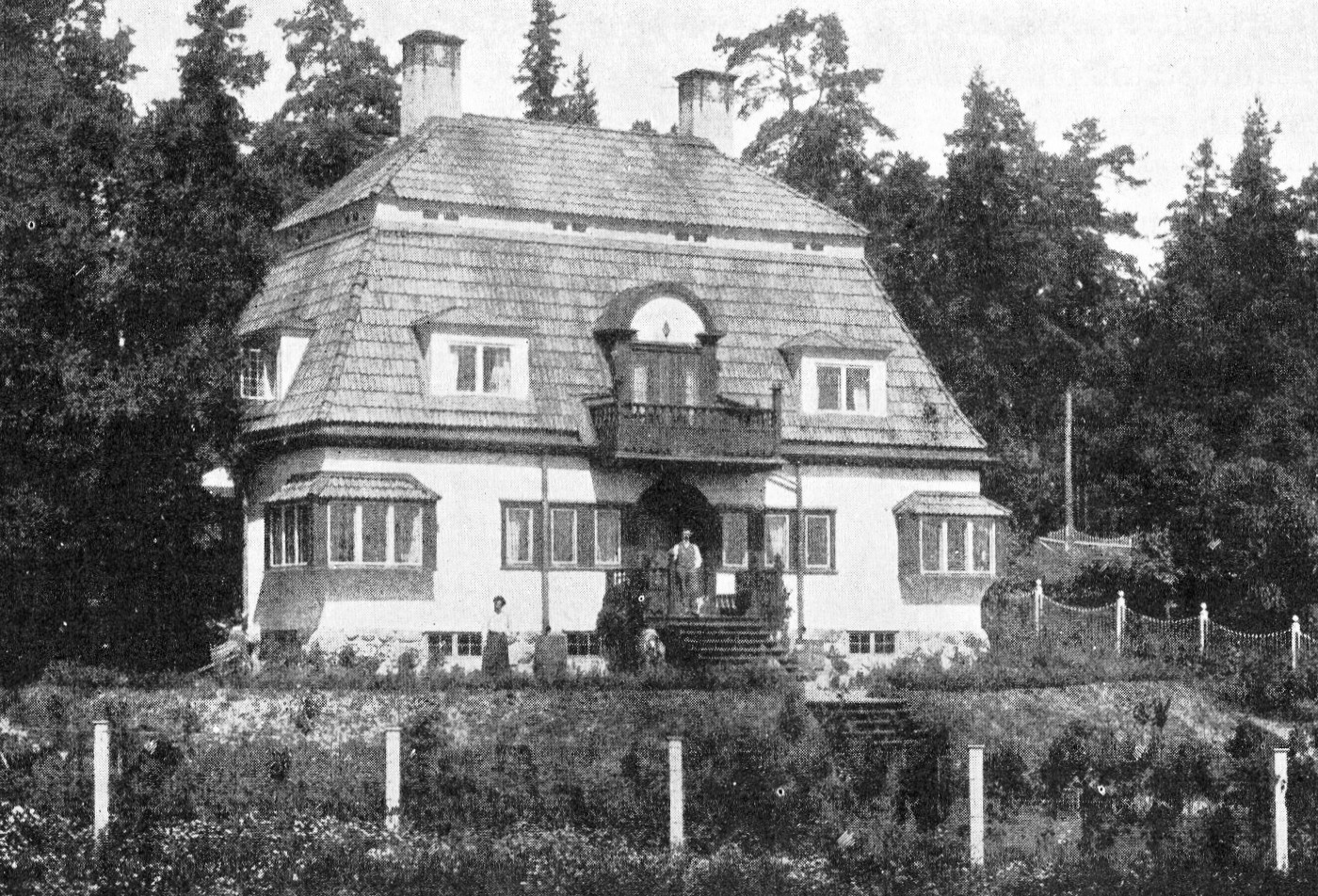 Wållgrens villa, Prästgårdsvägen 1, arkitekt Ivar Callmander